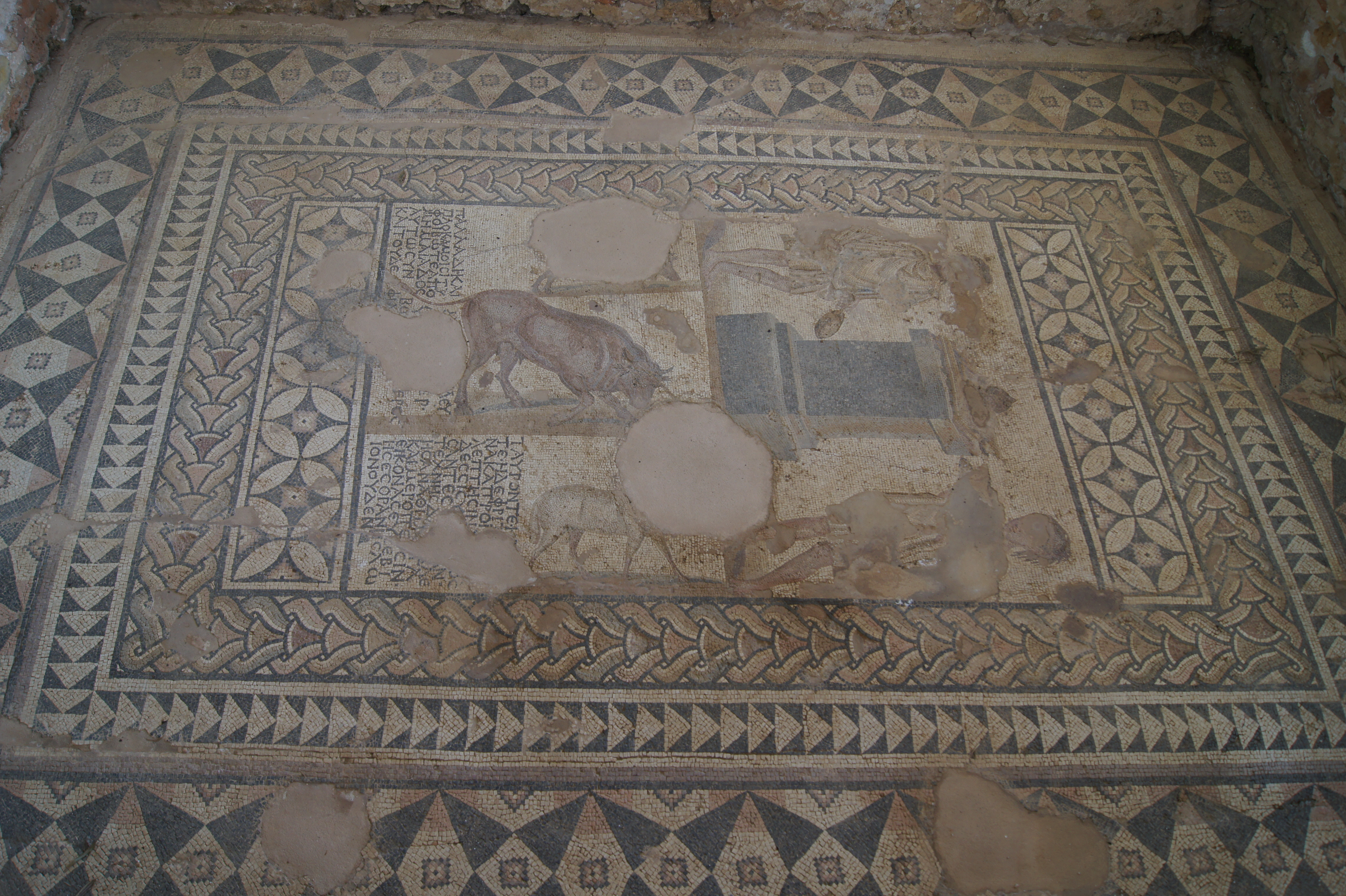 Sol couvert de mosaïques dans la pièce d'une villa romaine du IVe siècle ap. J.-C. à Skala (île de Céphalonie, Grèce). Représentation des rites préparatoires d'un sacrifice : deux jeunes gens de part et d'autre de l'autel, et au-dessous, les animaux destinés au sacrifice.